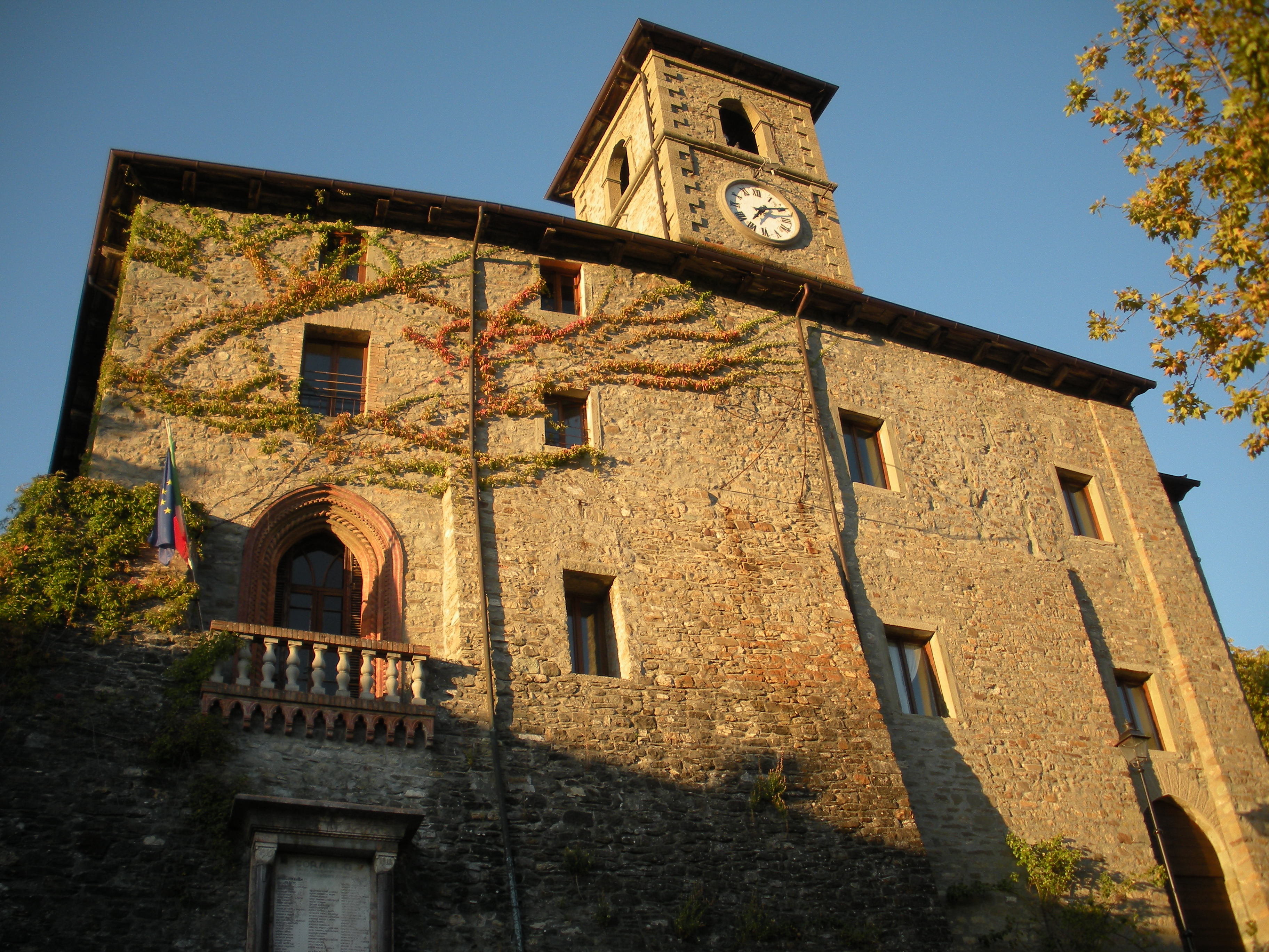 foto scattata da armandoria